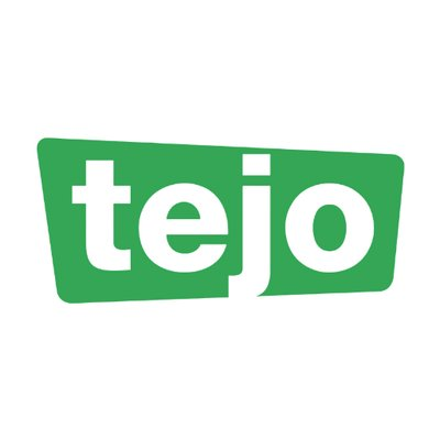 Emblemo de Tutmonda Esperantista Junulara Organizo (TEJO) uzata ekde la eksiĝo de la antaŭa stelo-emblemo